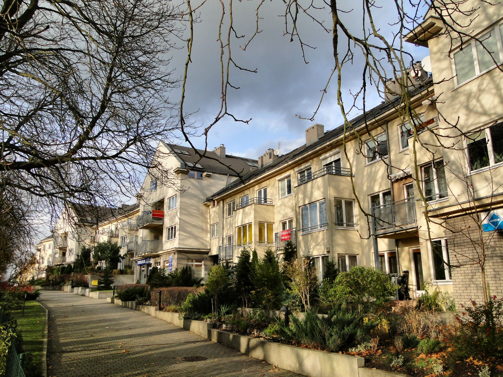 Osiedle Pod Kasztanami II w Szczecinie